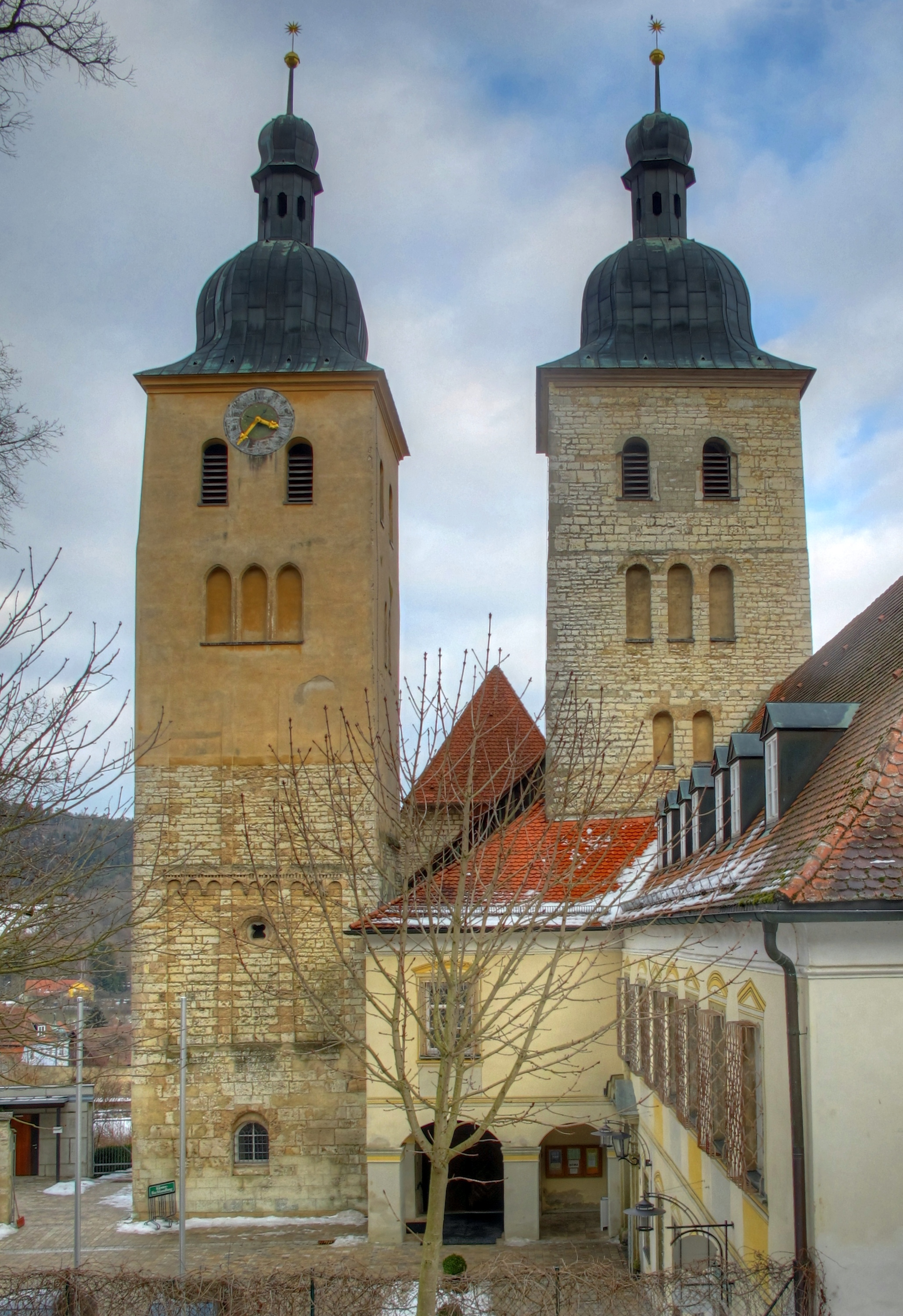 Deutschland, Bayern, Oberpfalz, Berching, romanische Klosterkirche Plankstetten